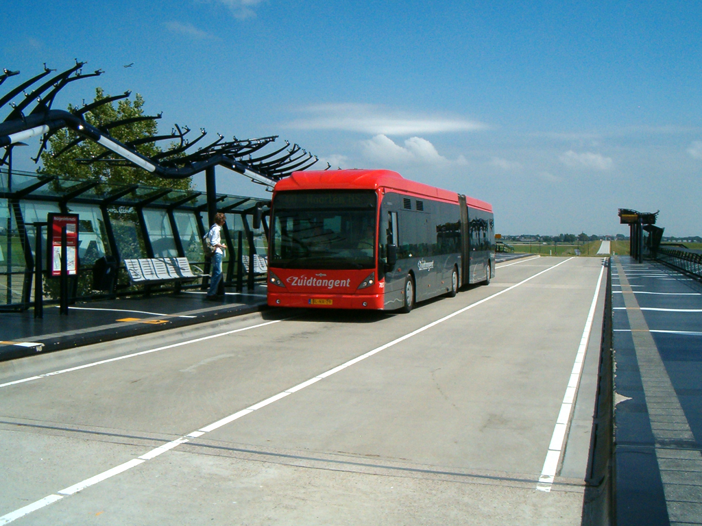 Zuidtangentbus op halte Beukenhorst (Hoofddorp, gemeente Haarlemmermeer).